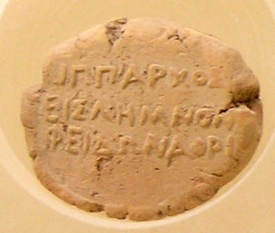 Jeton de terre cuite de l'hipparque (commandant de cavalerie) Pheidon à Lemnos, responsable de l'entraînement des recrues de cavalerie le long de la Voie Panathénaïque. Musée de l'Agora antique d'Athènes. Another version here